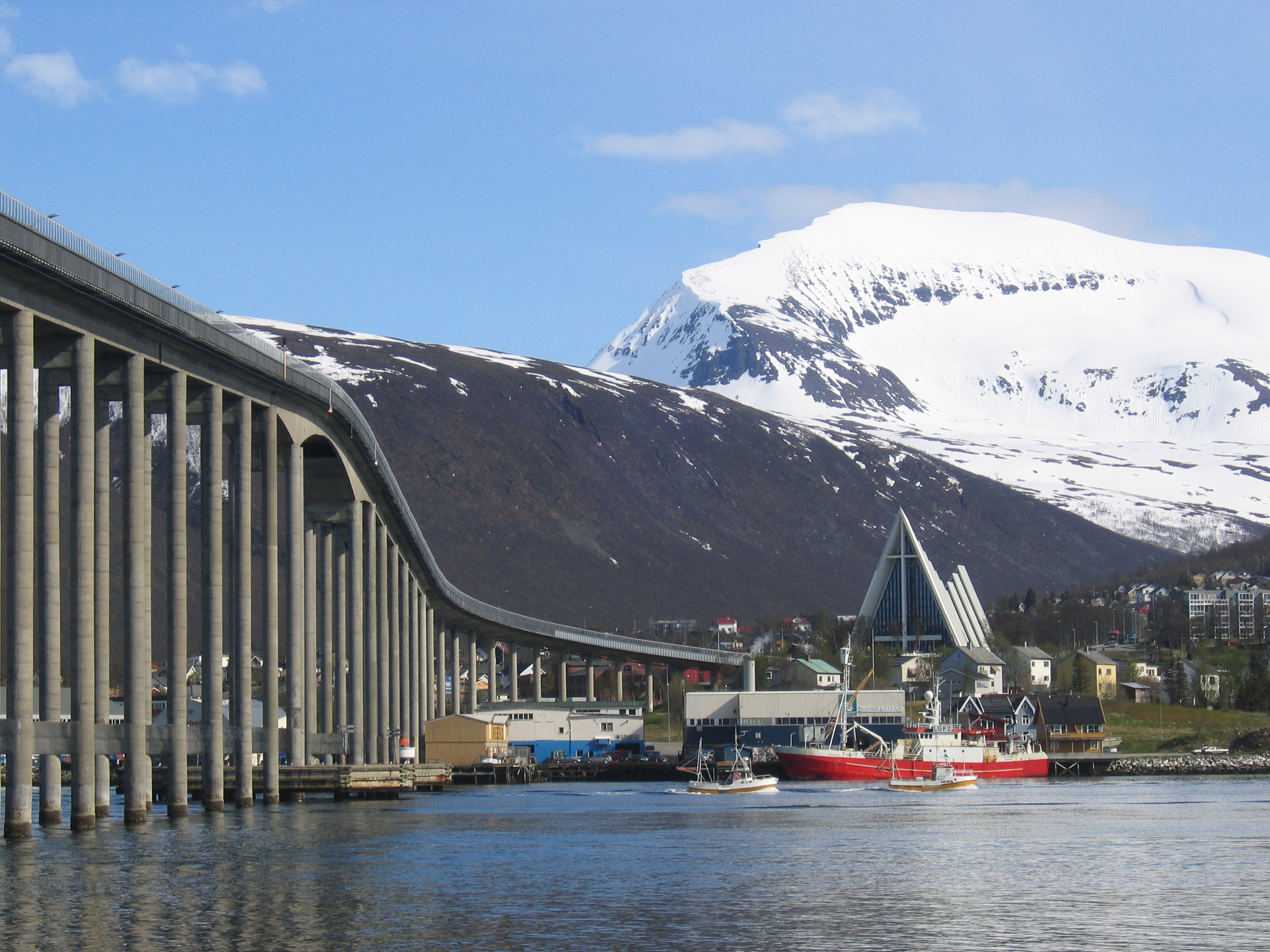 Tromsøbrua, med Ishavskatedralen og Tromsdalstind i bakgrunnen.